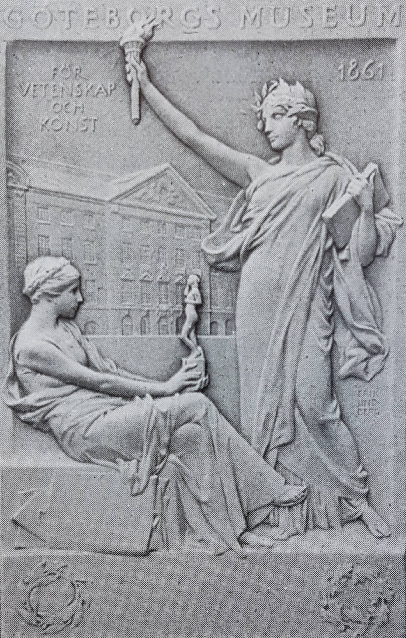 Göteborgs museums jubileumsplskett skapad av Erik Lindberg